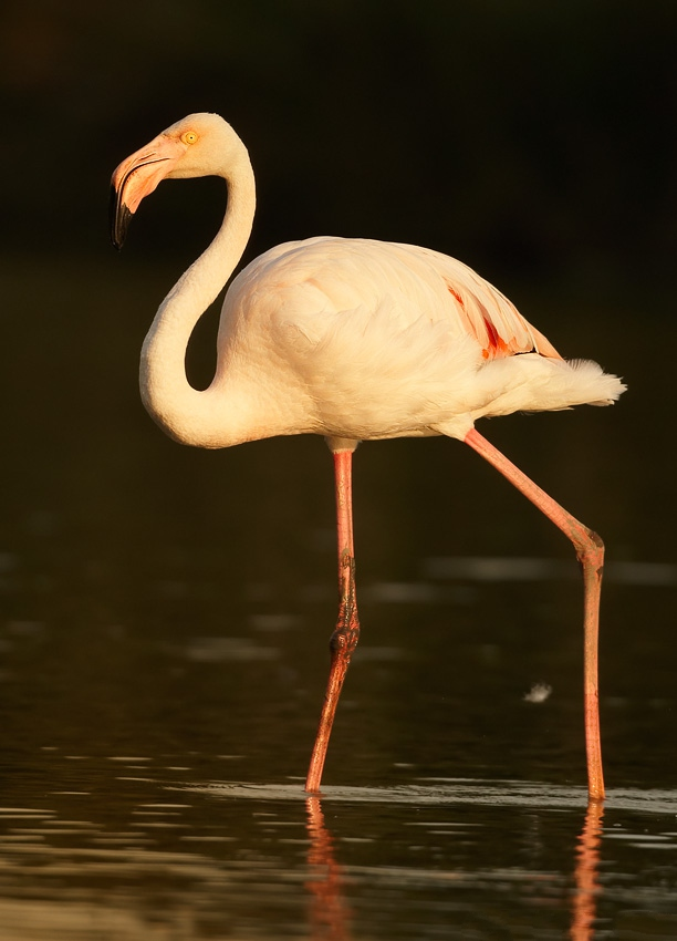 Phoenicopterus roseus, Camargue, France